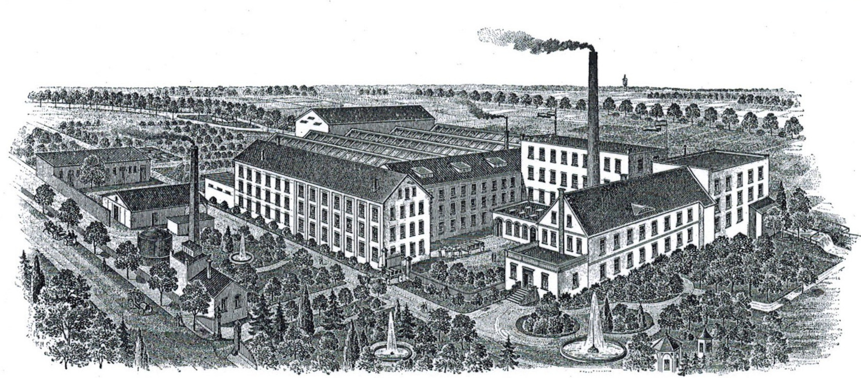 Fabrik Löw, früher